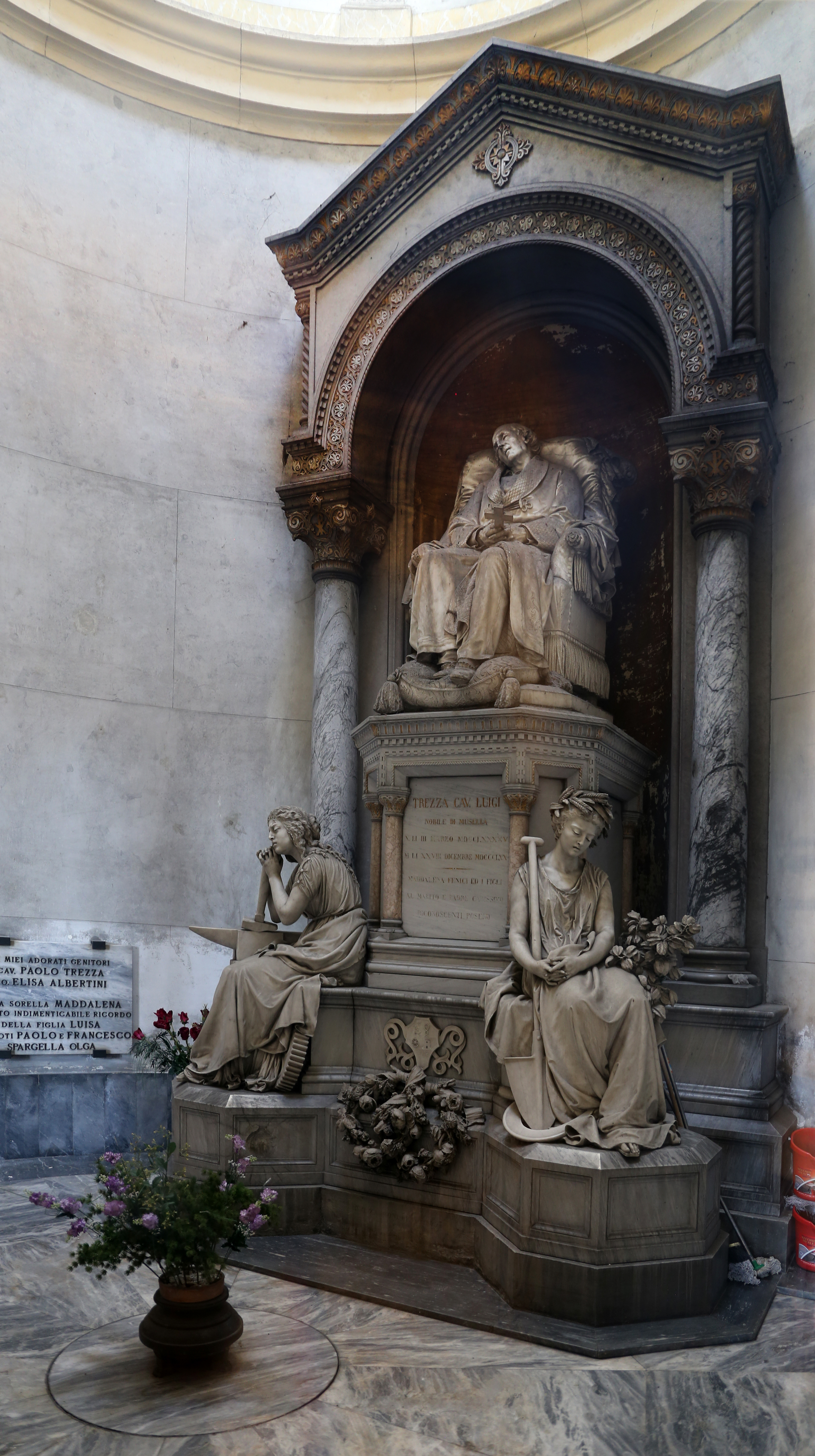 cimitero monumentale di Verona This is a photo of a monument which is part of cultural heritage of Italy.